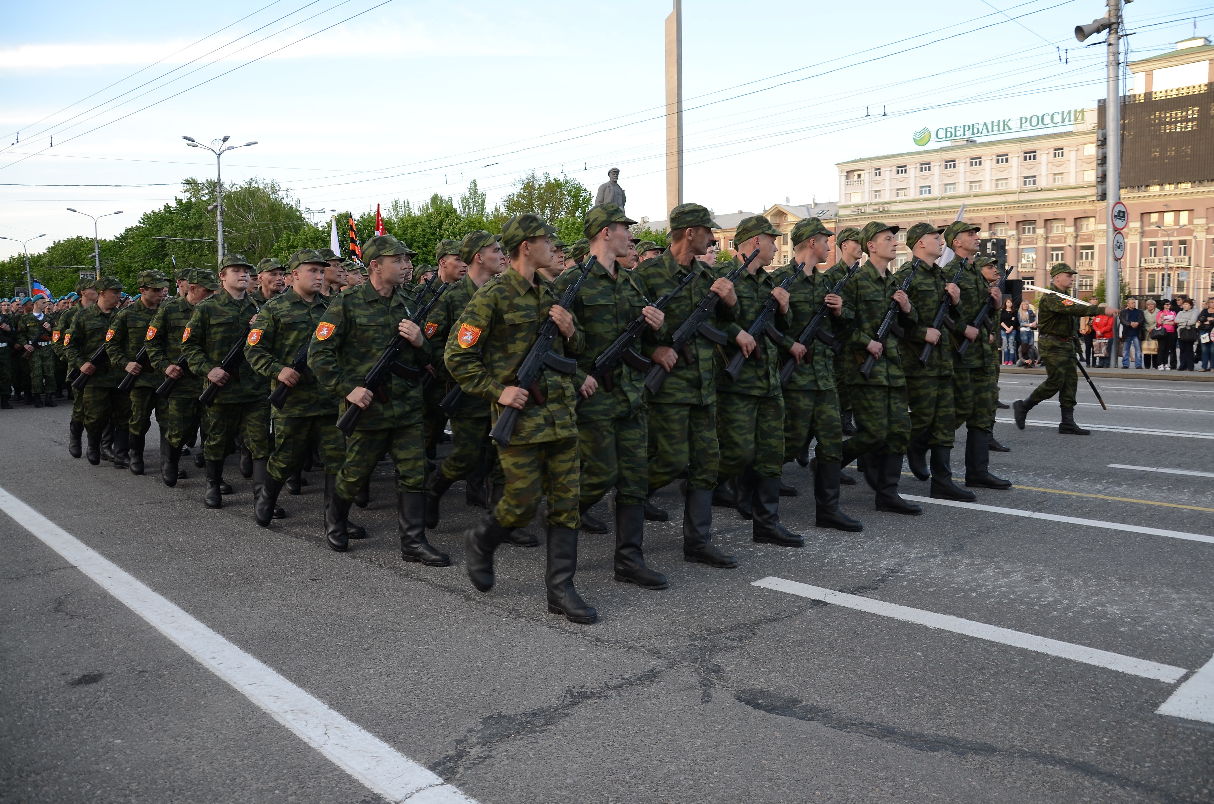 Репетиция парада в честь дня Победы в Донецке